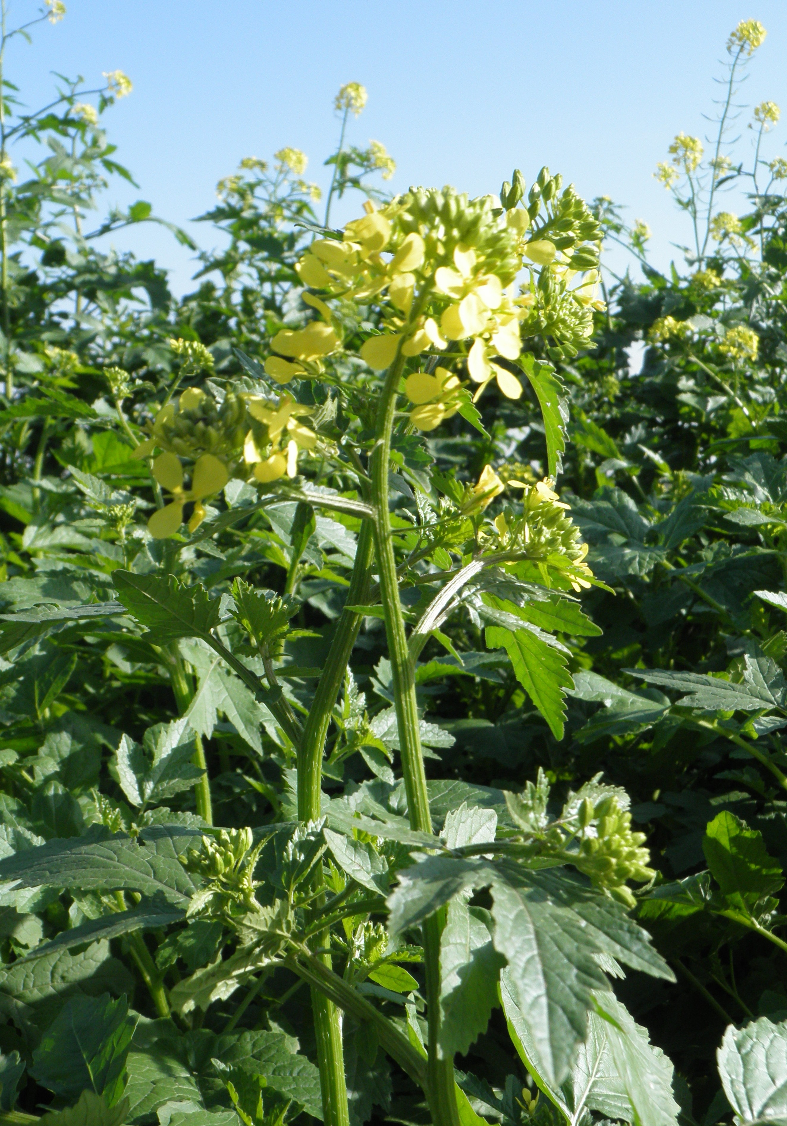 flowers חרדל לבן